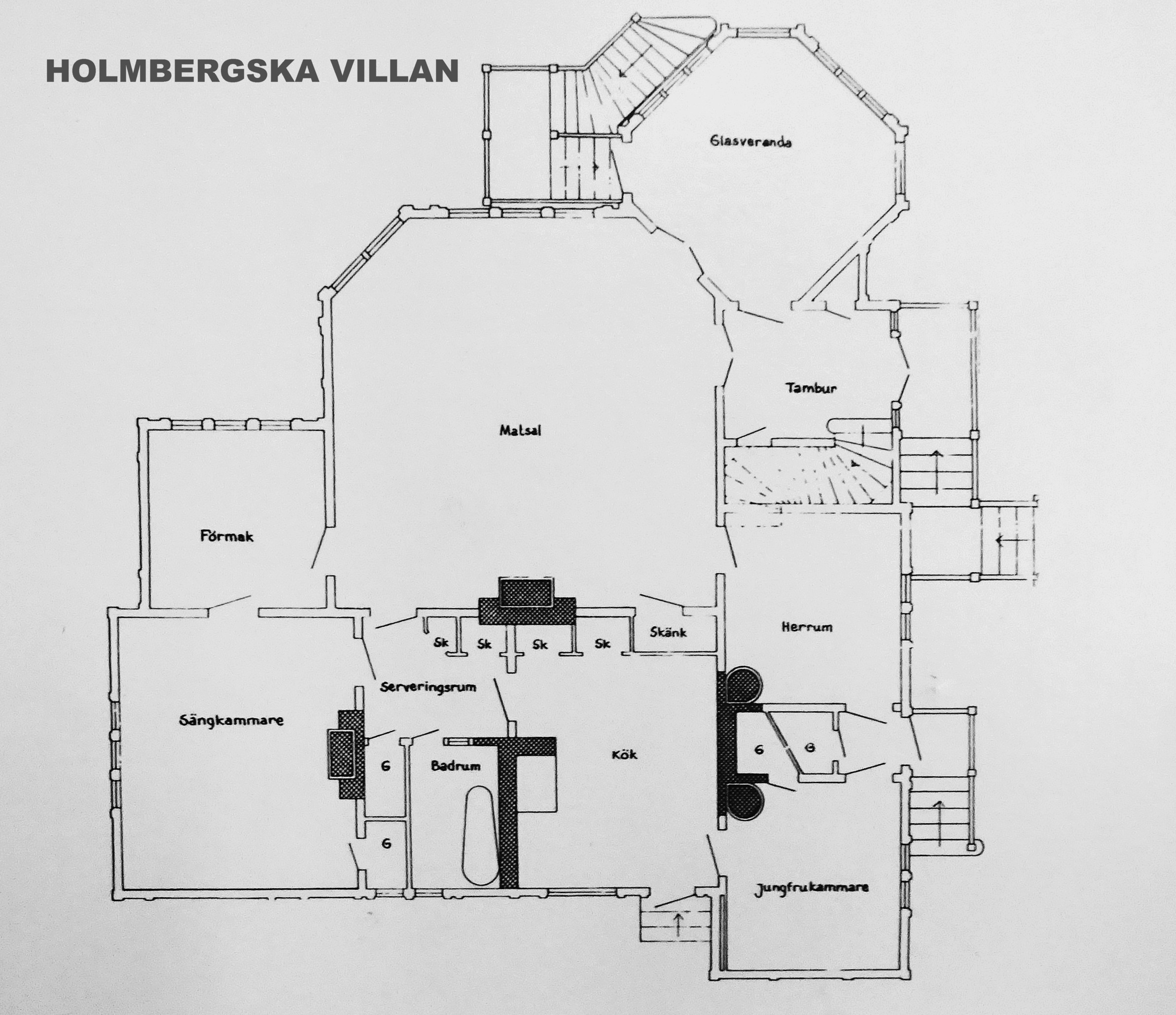 Huset uppfördes 1885 som sommarhus för byggmästaren Jöns Peter Holmberg från Stockholm efter ritningar av arkitekt Ernst Haegglund. 1966 revs villan för att ge plats åt Scania-Vabis personalbostäder. Matsalen och verandan bevarades och skänktes till Torekällbergets museum